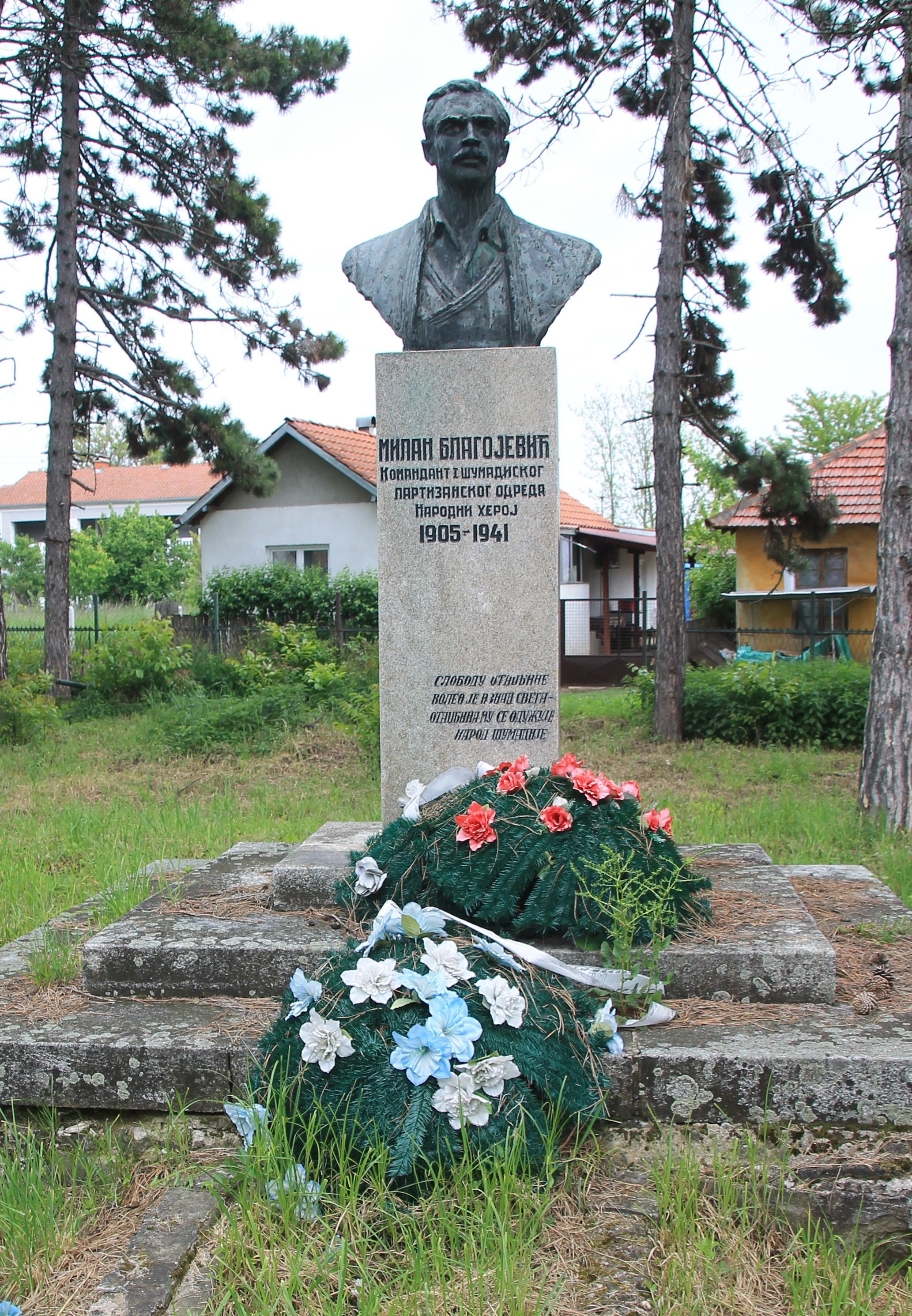 Spomen park sa grobom Milana Blagojevićem